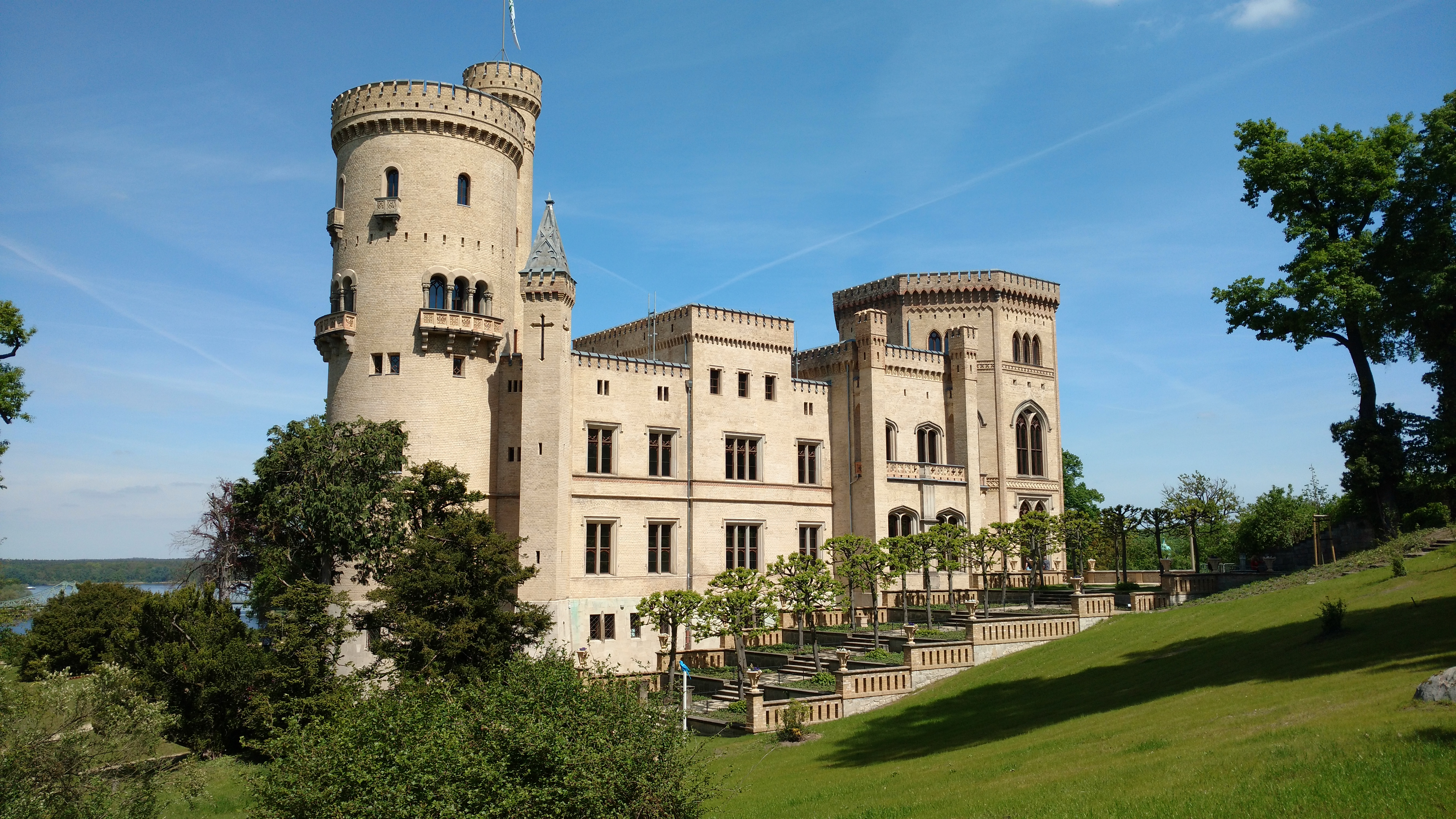 Rückseite von Schloss Babelsberg, Voltaireterrkse